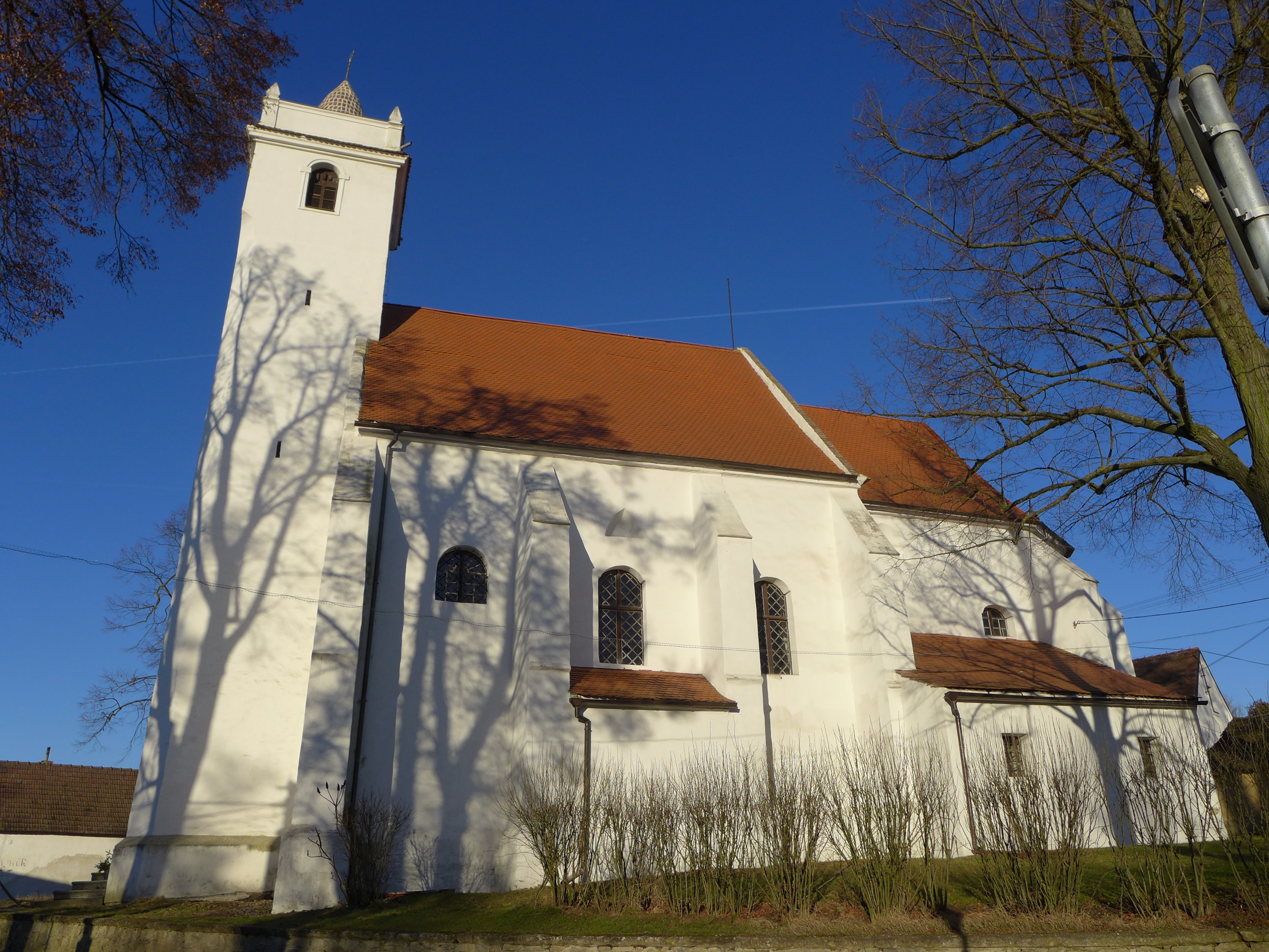 Kostel Nanebevzetí Panny Marie, Stálky.